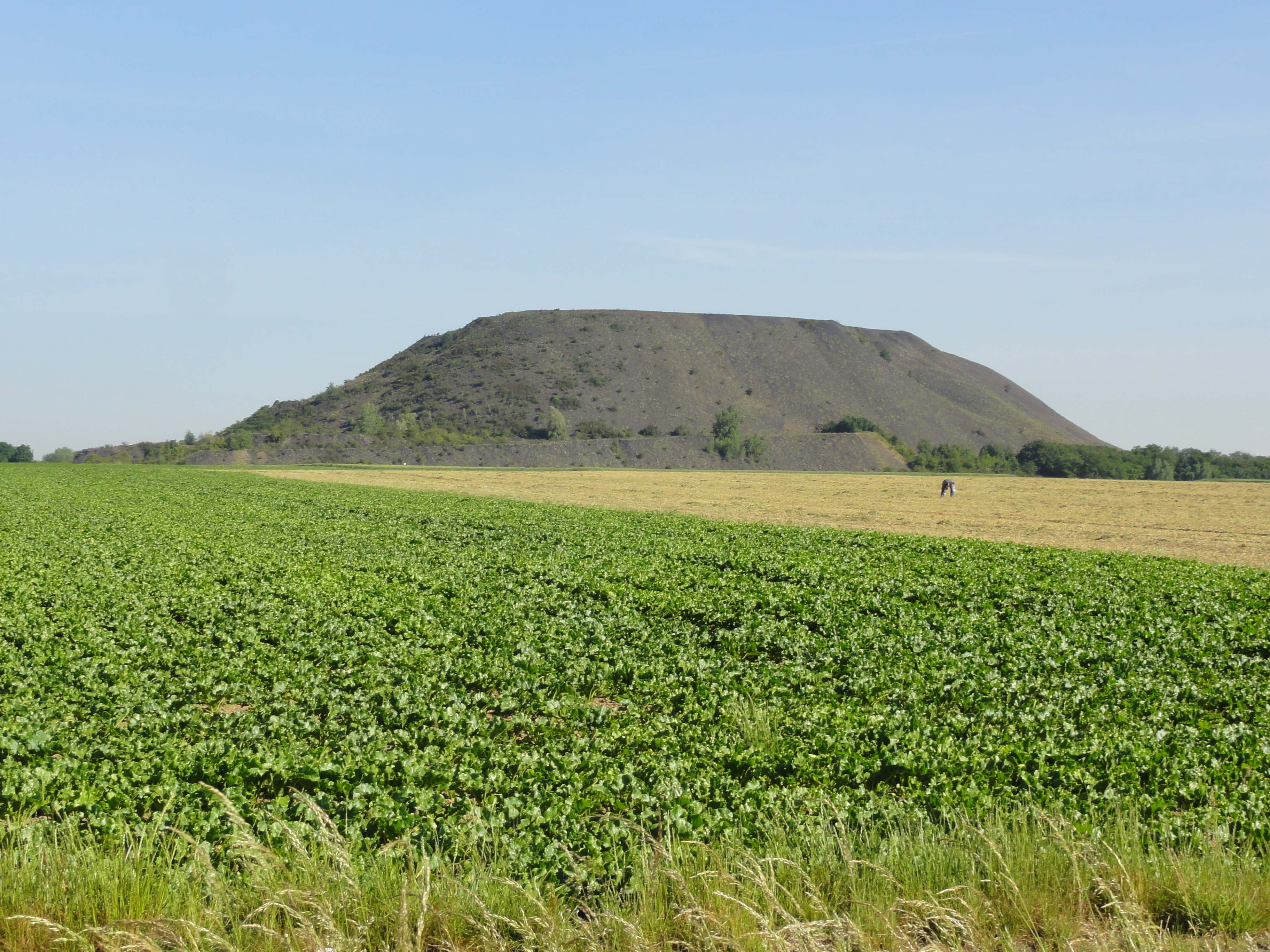 Terril n° 98 dit 24 Nord de Courrières, fosse n° 24 - 25 de la Compagnie des mines de Courrières dans le bassin minier du Nord-Pas-de-Calais, Estevelles, Pas-de-Calais, Nord-Pas-de-Calais, France. Le terril no 98 est inscrit sur la liste du patrimoine mondial de l'Unesco le 30 juin 2012 et y constitue en partie le site no 51.